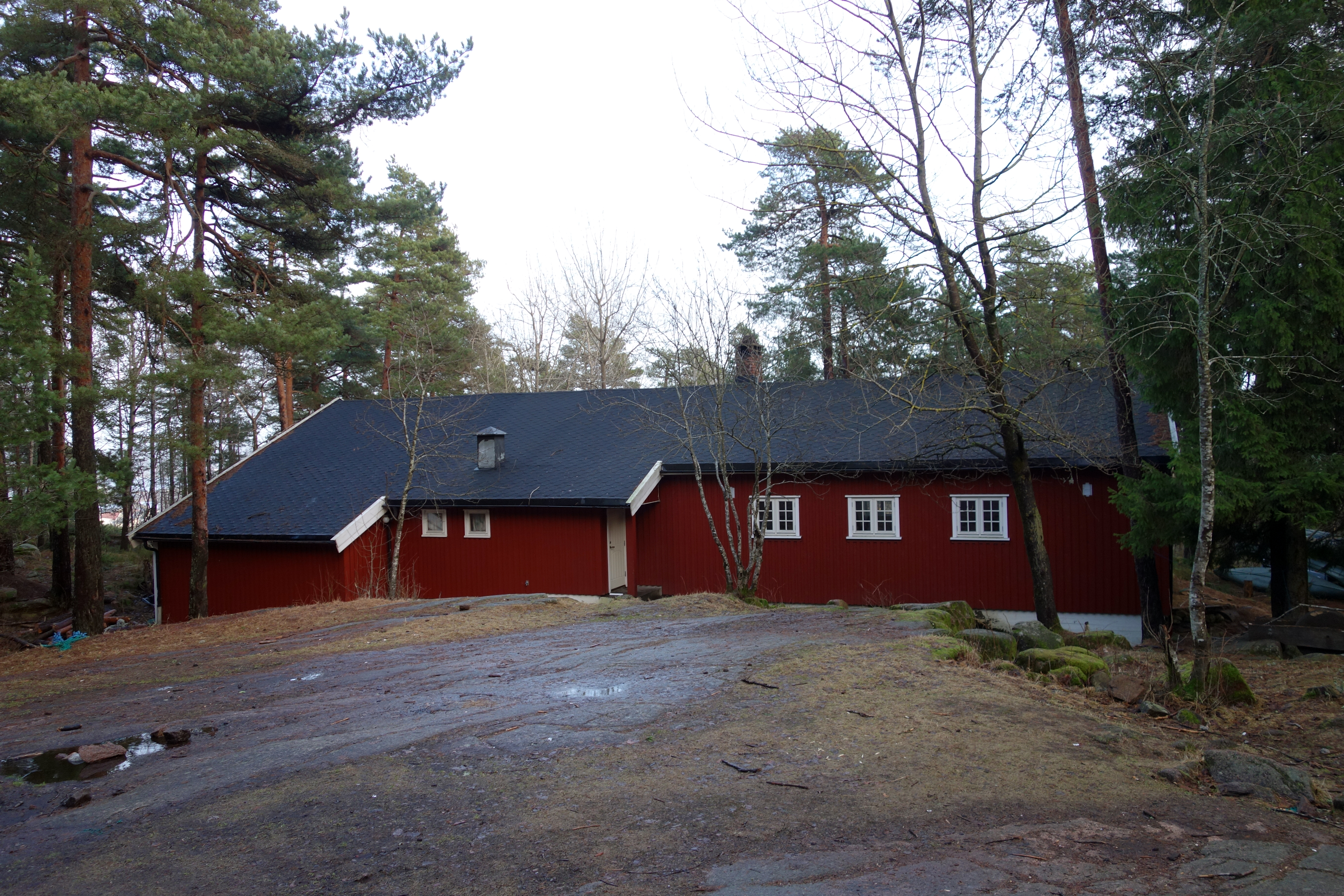 Speiderbo i Teieskogen på Nøtterøy i Vestfold